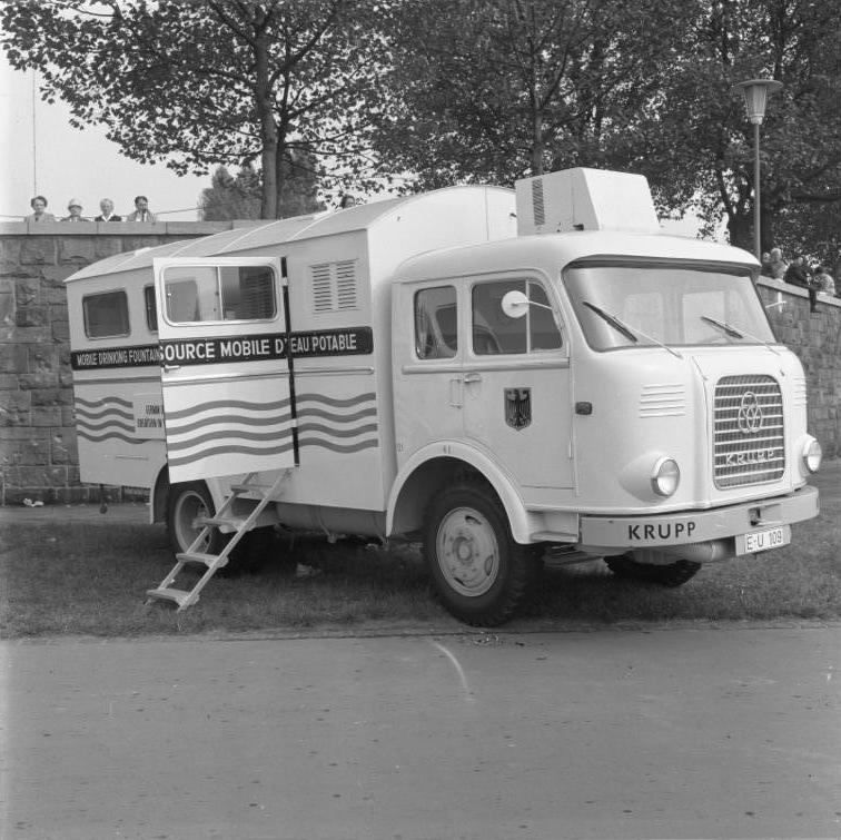 Düsseldorf: Westafrikazug der BRD